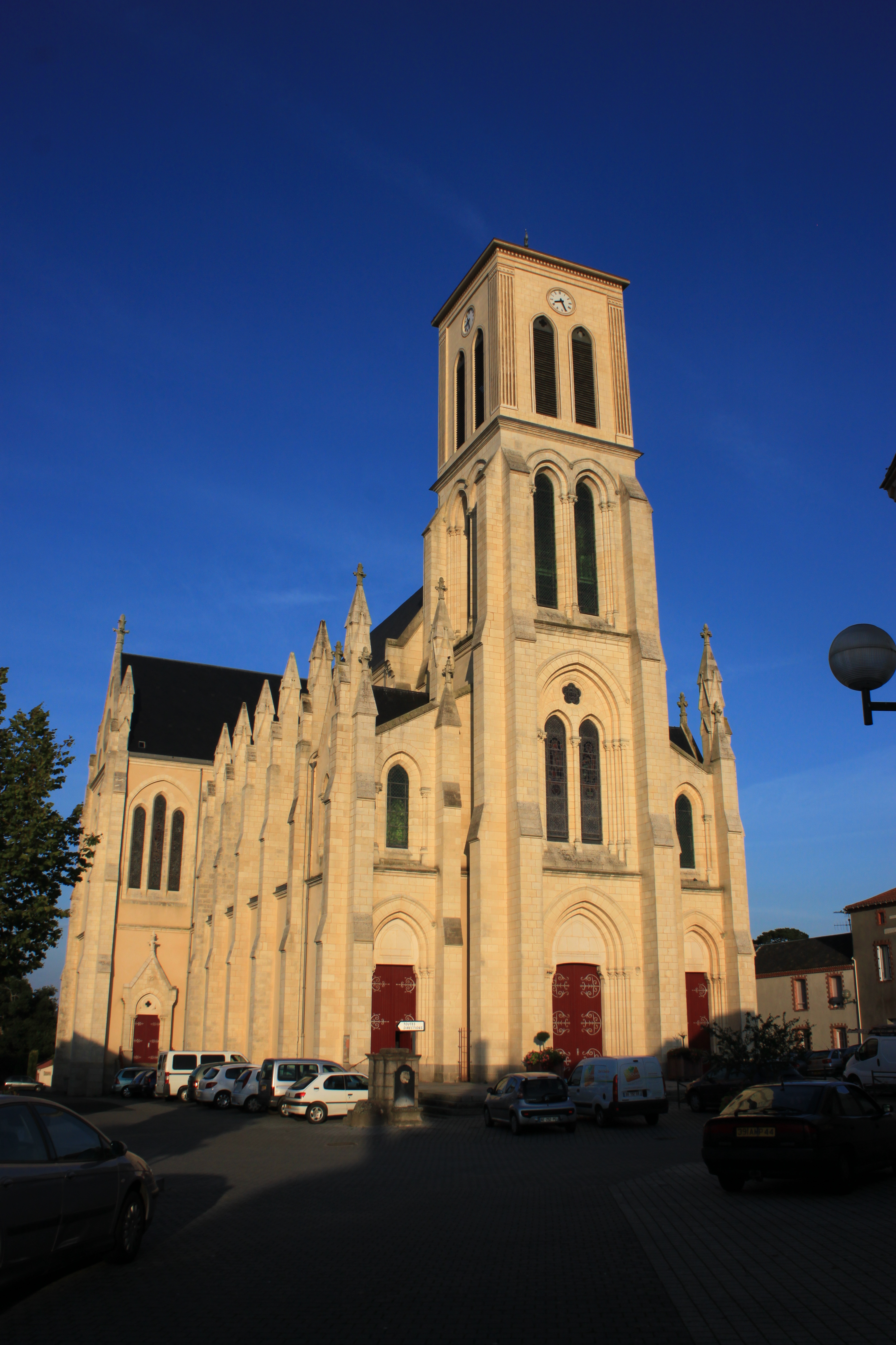 Église Notre-Dame, 1874, Vieillevigne.